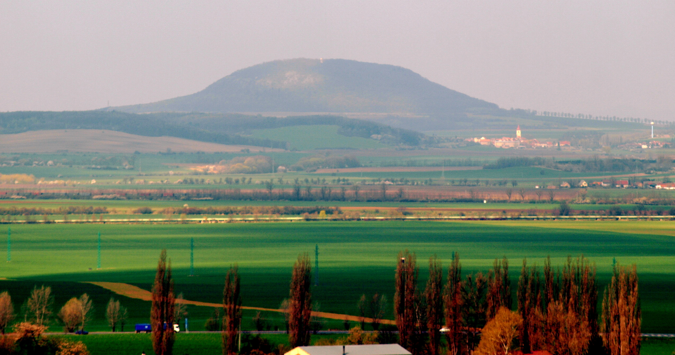 Říp od Mělníka